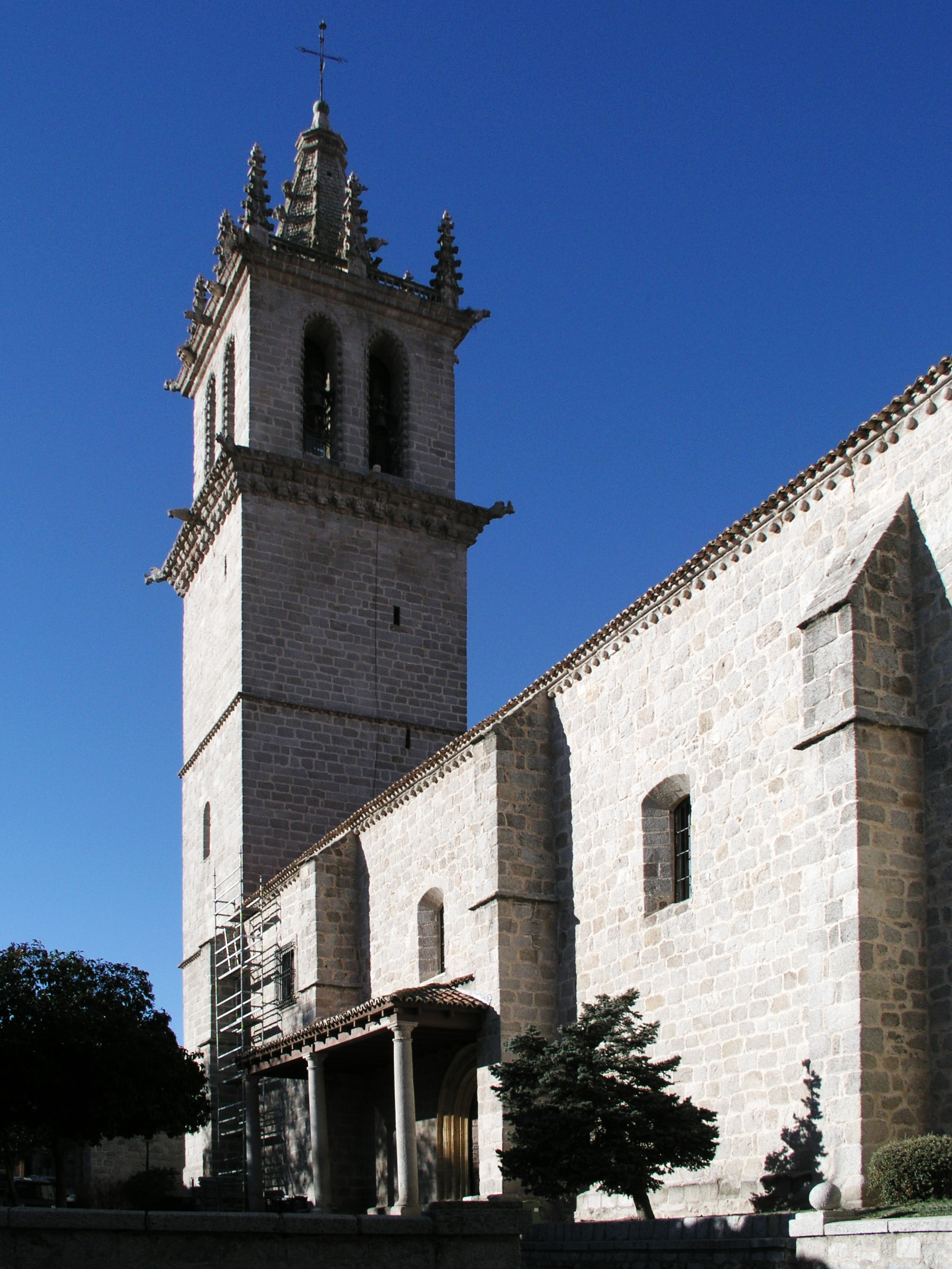 Colmenar Viejo, Madrid, Spain. Basílica de la Asunción de Nuestra Señora de Colmenar Viejo. View